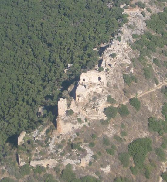 מבצר המונפור. תמונה לכיוון מזרח. צילמתי והעלתי בקיץ 2005. אסף.צ 16:41, 12 ספטמבר 2005 (UTC)